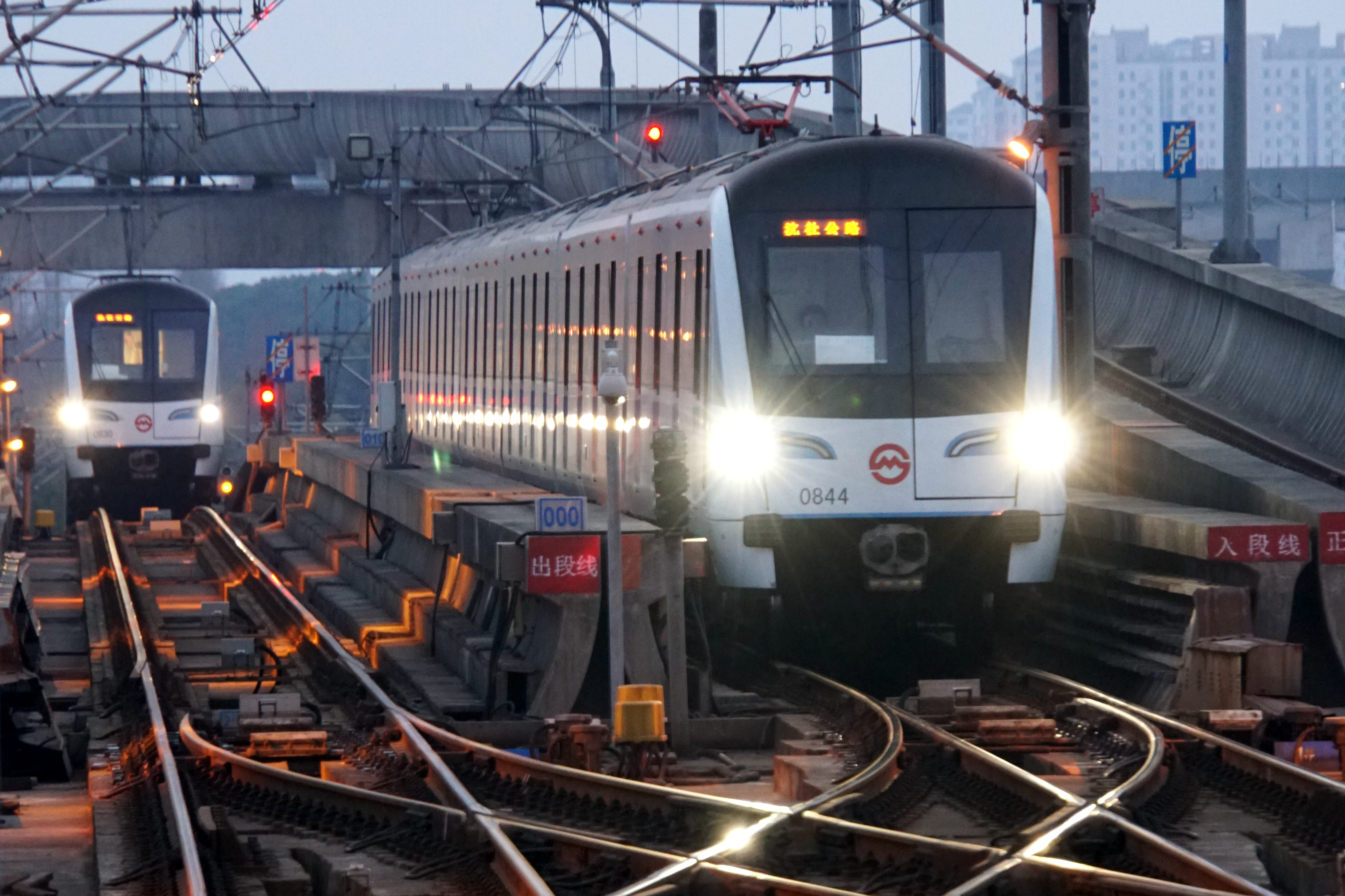 8号线列车正在开出沈杜公路站折返线